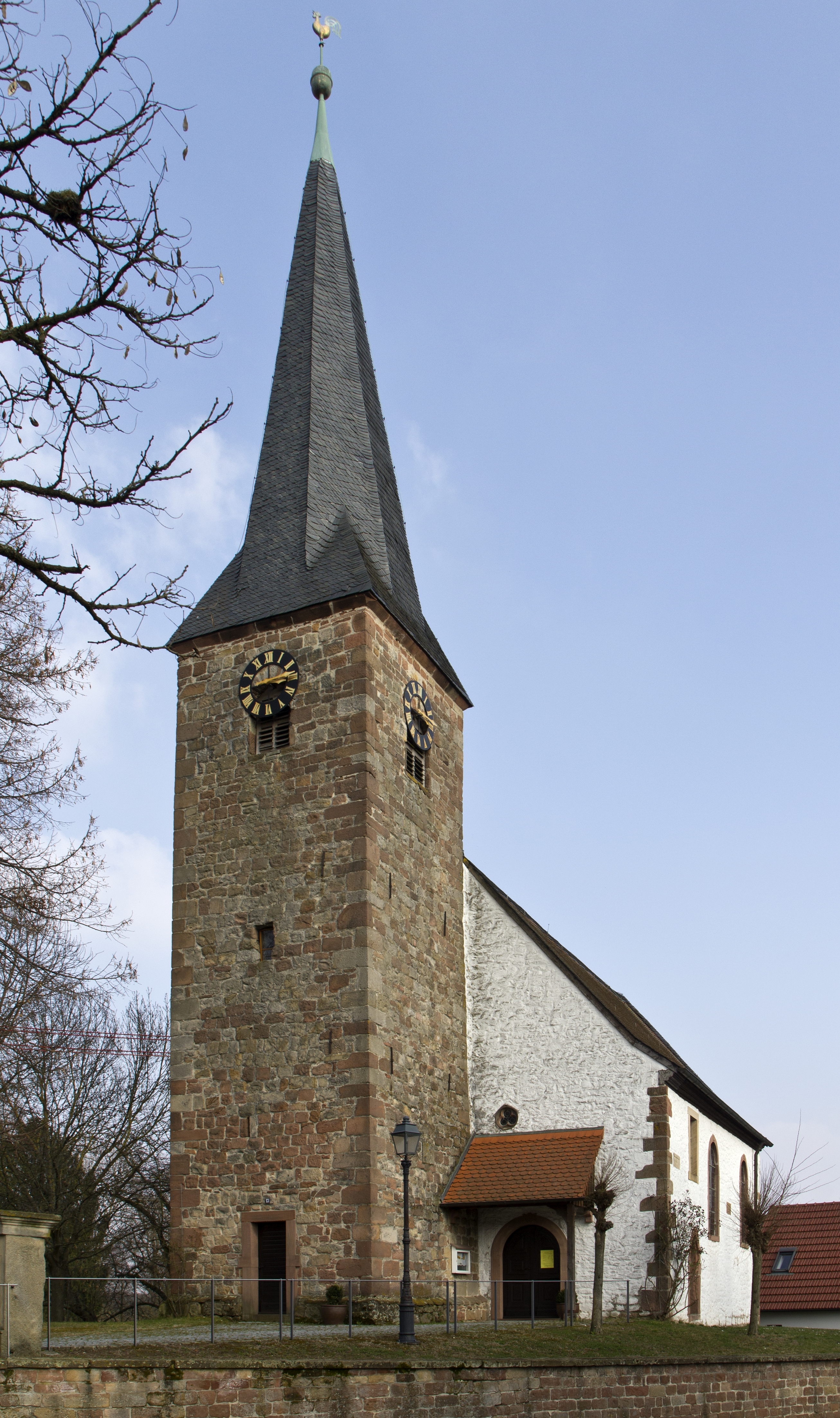 Heuchelheim-Klingen, Ortsteil Klingen, Protestantische Kirche